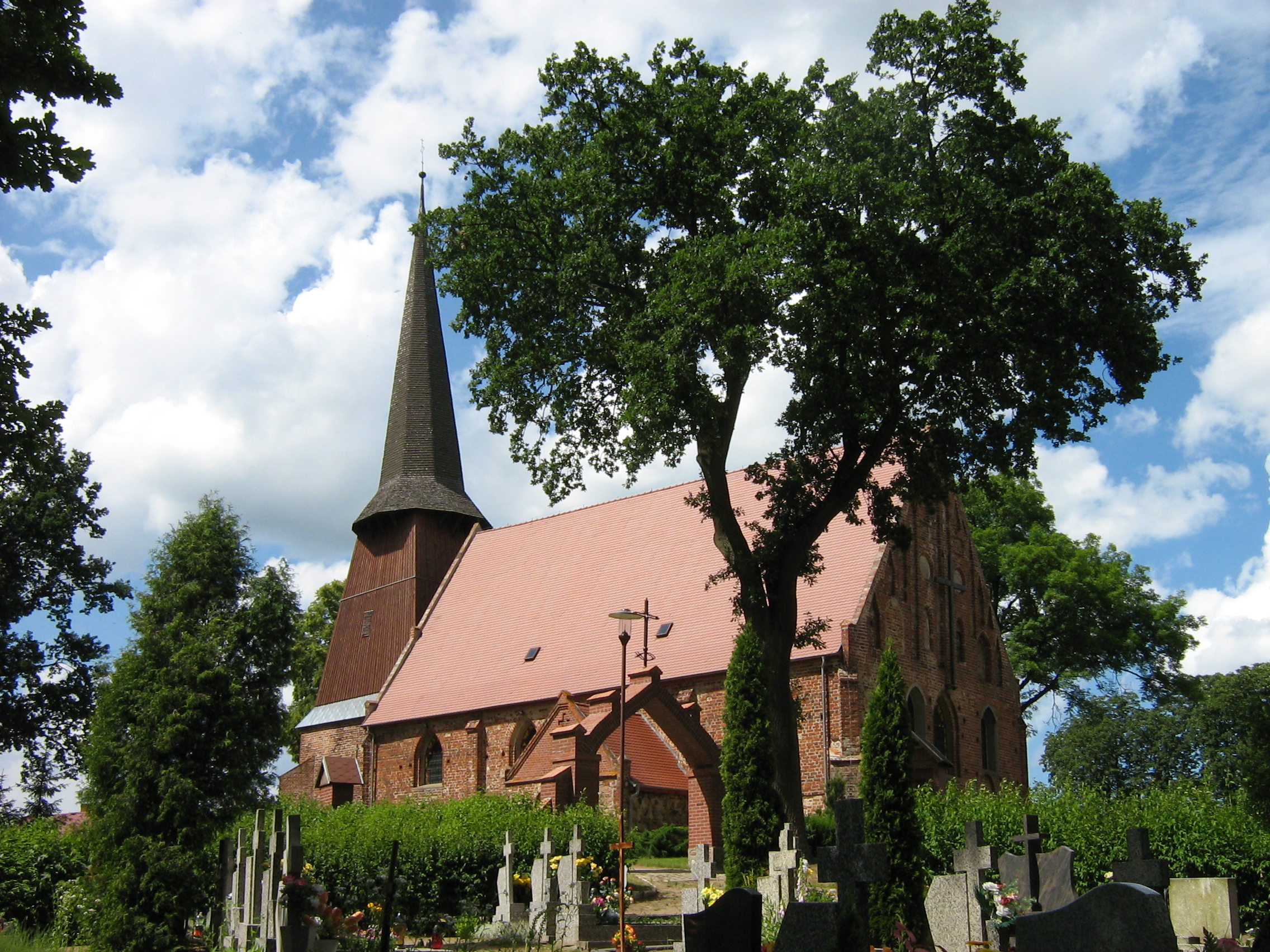 Cerkwica - rzymskokatolicki kościół parafialny p.w. Najświętszego Serca Pana Jezusa, XV